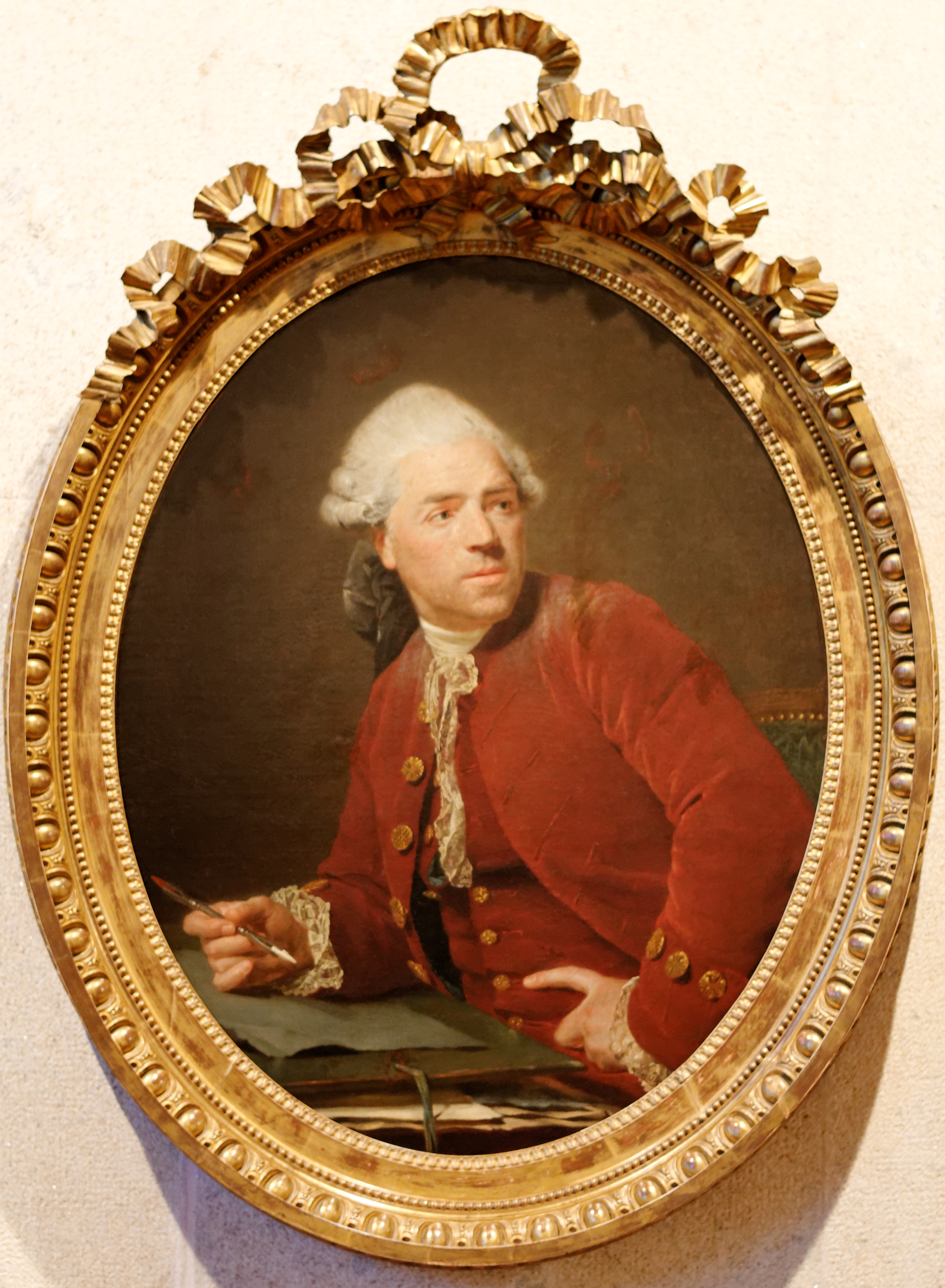 Nicolas-Bernard Lépicié, Autoportrait, vers 1777. Huile sur toile, Lisbonne, musée Calouste Gulbenkian. Inv 2386